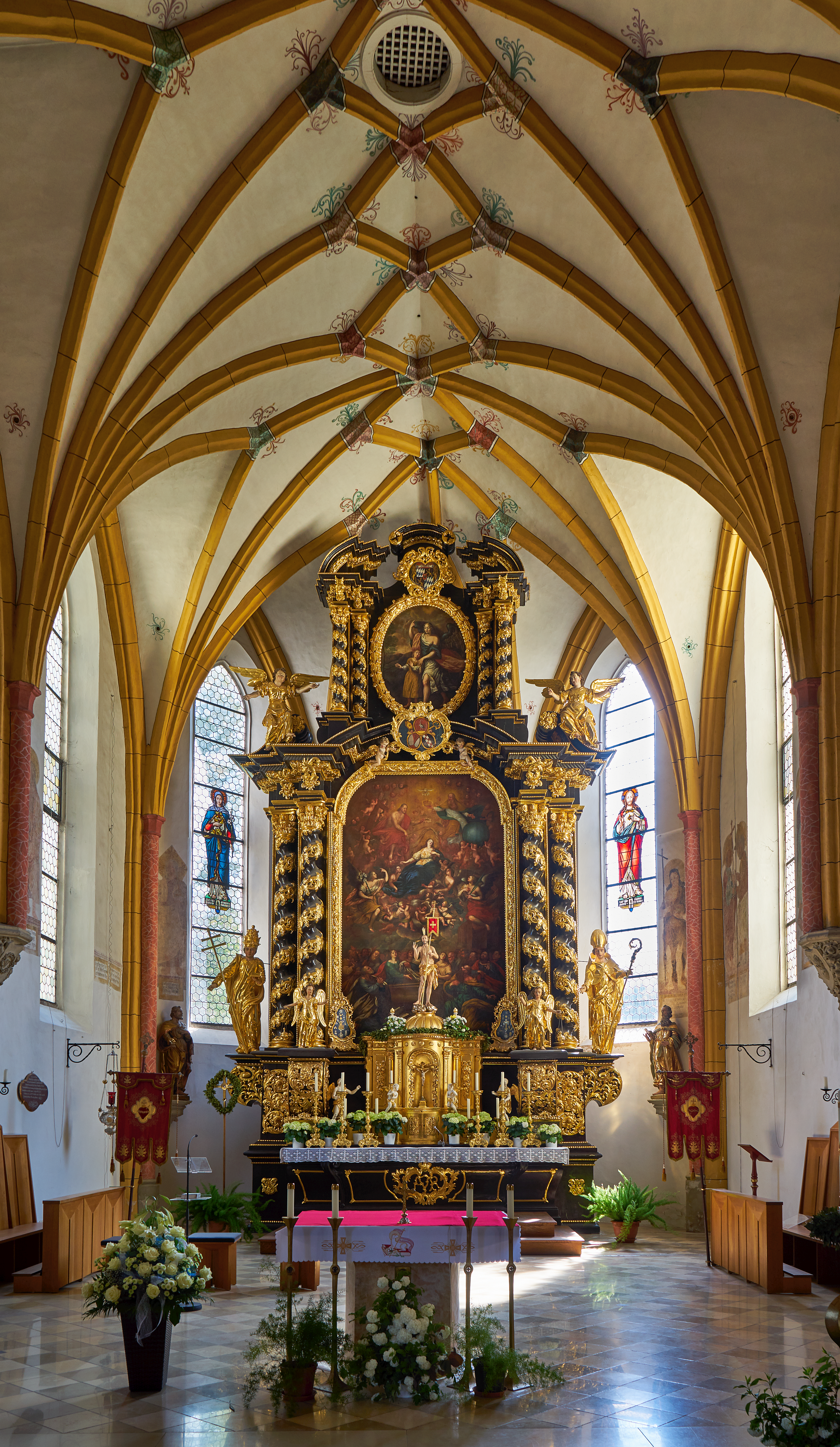 Pfarrkirche Mariä Himmelfahrt Rotthalmünster, der schwarz polierte, vergoldete Hochaltar mit einem schlank proportionierten Aufbau aus der Zeit um 1700